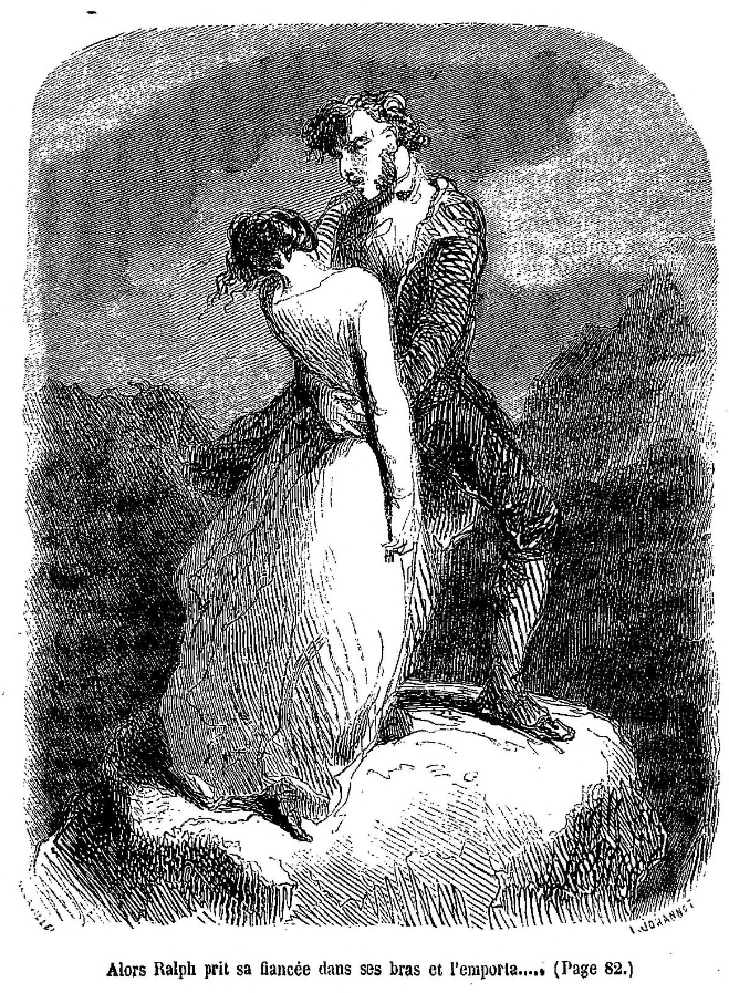 "Alors Ralph prit sa fiancé dans ses bras et l'emporta..." (Page 81.) Illustration de Tony Johannot pour une réédition du roman "Indiana" de George Sand chez Hetzel (Paris) en 1861.